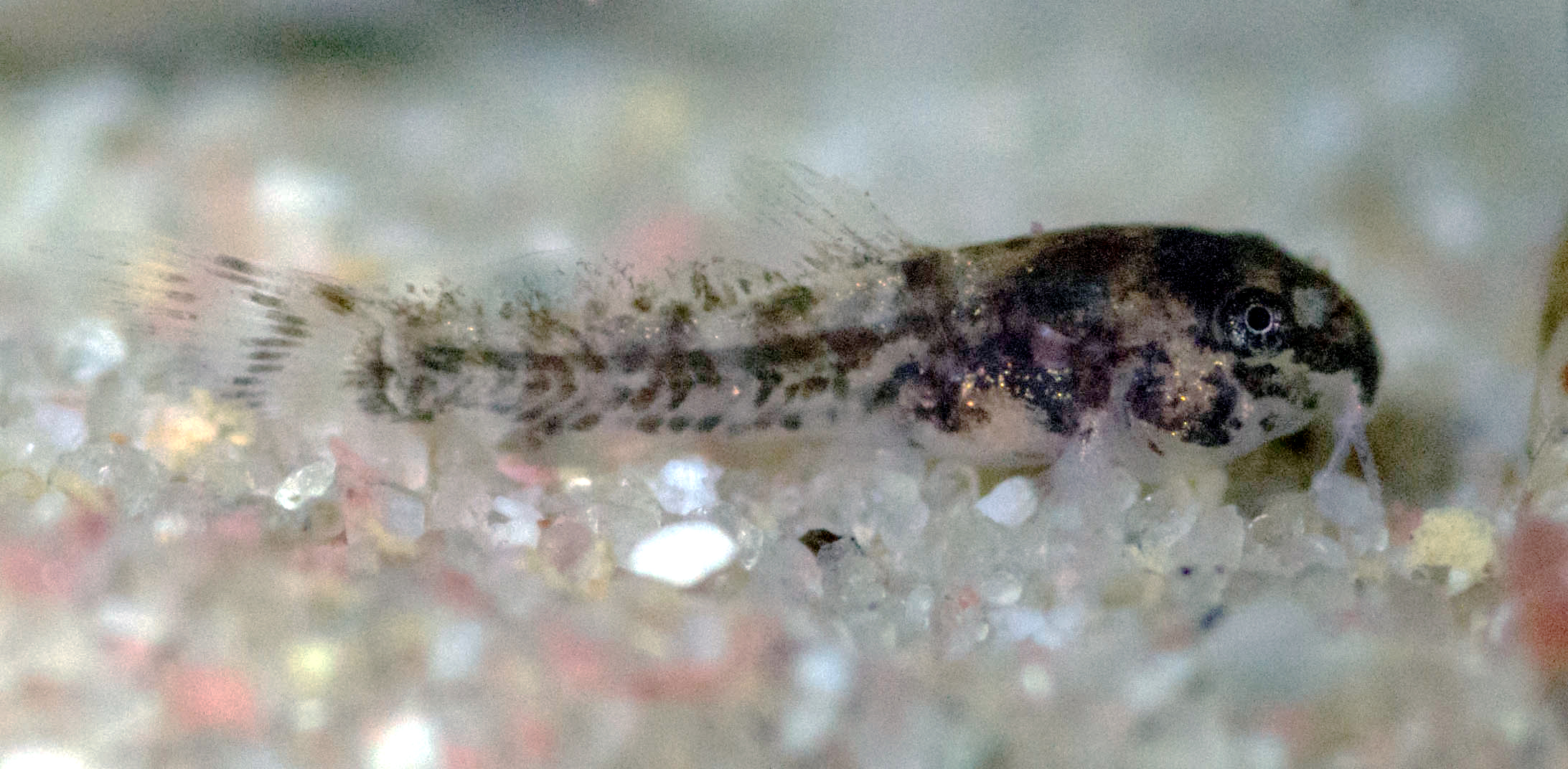 1-1,5 cm großer, 1 bis 2 Wochen alter Jungfisch der Art Corydoras habrosus